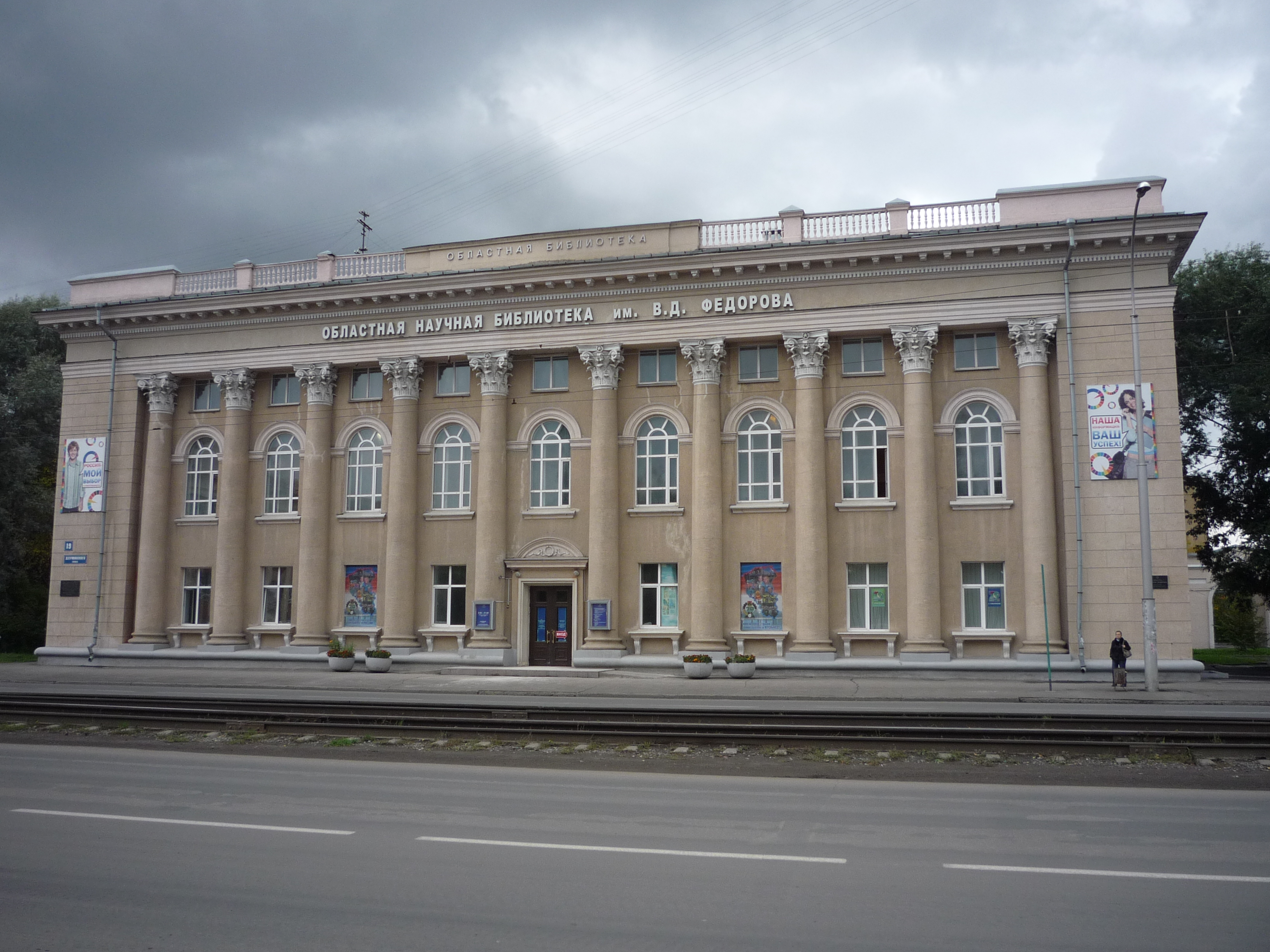 Областная библиотека (г.Кемерово)